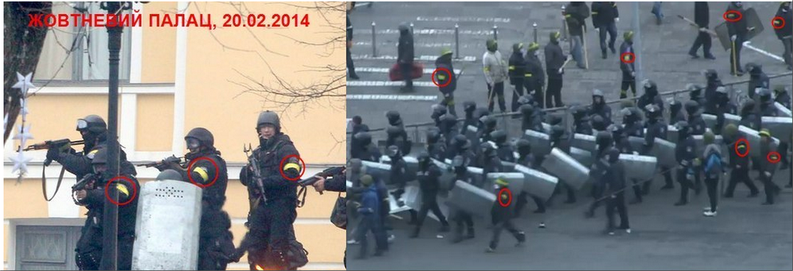 спецслужби із жовтими розпізнавальними стрічками-пов'язками